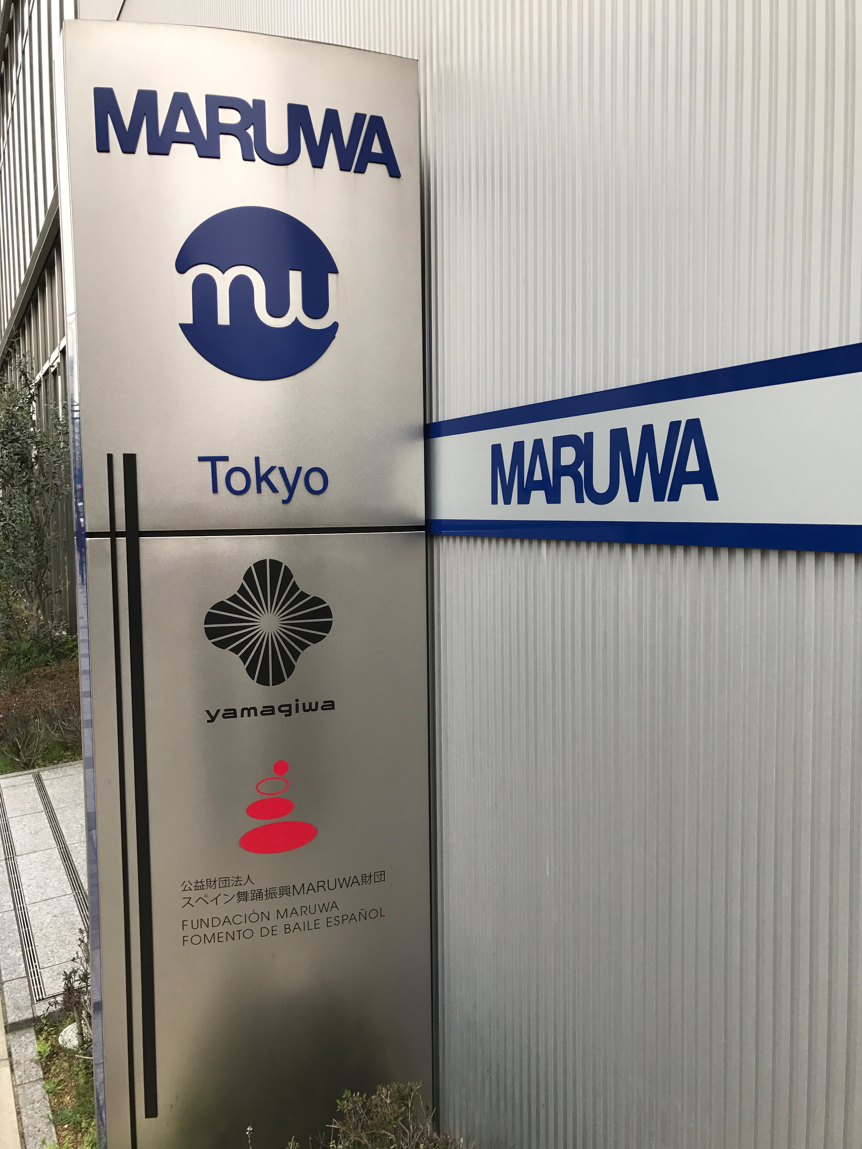 MARUWAビル